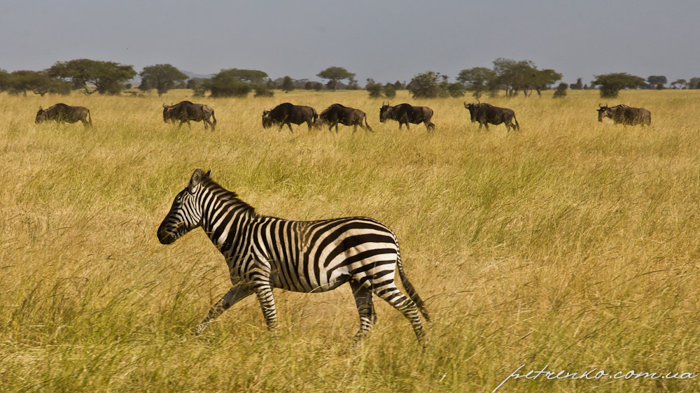 Bariadi, Tanzania